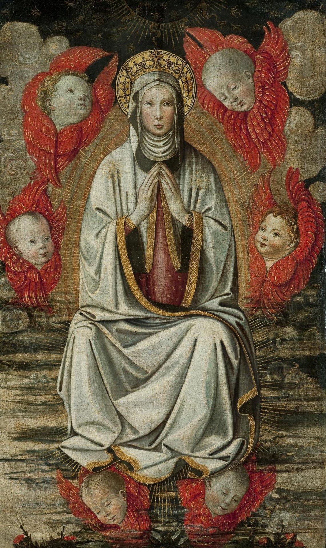 Холст, темпера, 80 х 48 см. Эрмитаж, поступил в 1926 г. из собрания Строгановых. Инвентарный номер: ГЭ-4129